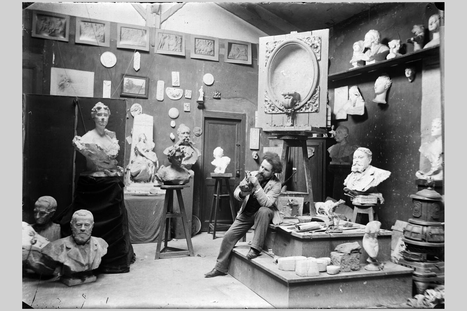 Le sculpteur Pierre Devaux dans son atelier. Artistes lyonnais dans leur atelier [le sculpteur Pierre Devaux (1865-1938), vers 1900]. Photographie, négatif sur verre, 13 x 18 cm. Identification présumée. Une des deux boites qui contenaient cette suite de clichés portait une liste manuscrite de noms d'artistes lyonnais : de Belair [Fernand Mitifiot de B. (1849-1928)] / Jung [Charles Frédéric J. (1865-1936] / Devaux [Pierre D. (1865-1938)] / Ginsburger / Perrier [Pierre P. (1850-1910)] / Poncet [Jean-Baptiste P. (1827-1901)] / Lortet [Leberecht L. (1826-1901)] / Huvey [Jh H. (1868-1954)].